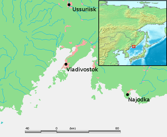 Mapa de localización de tres ciudades rusas: Vladivostok, Ussuriisk y Najodka.